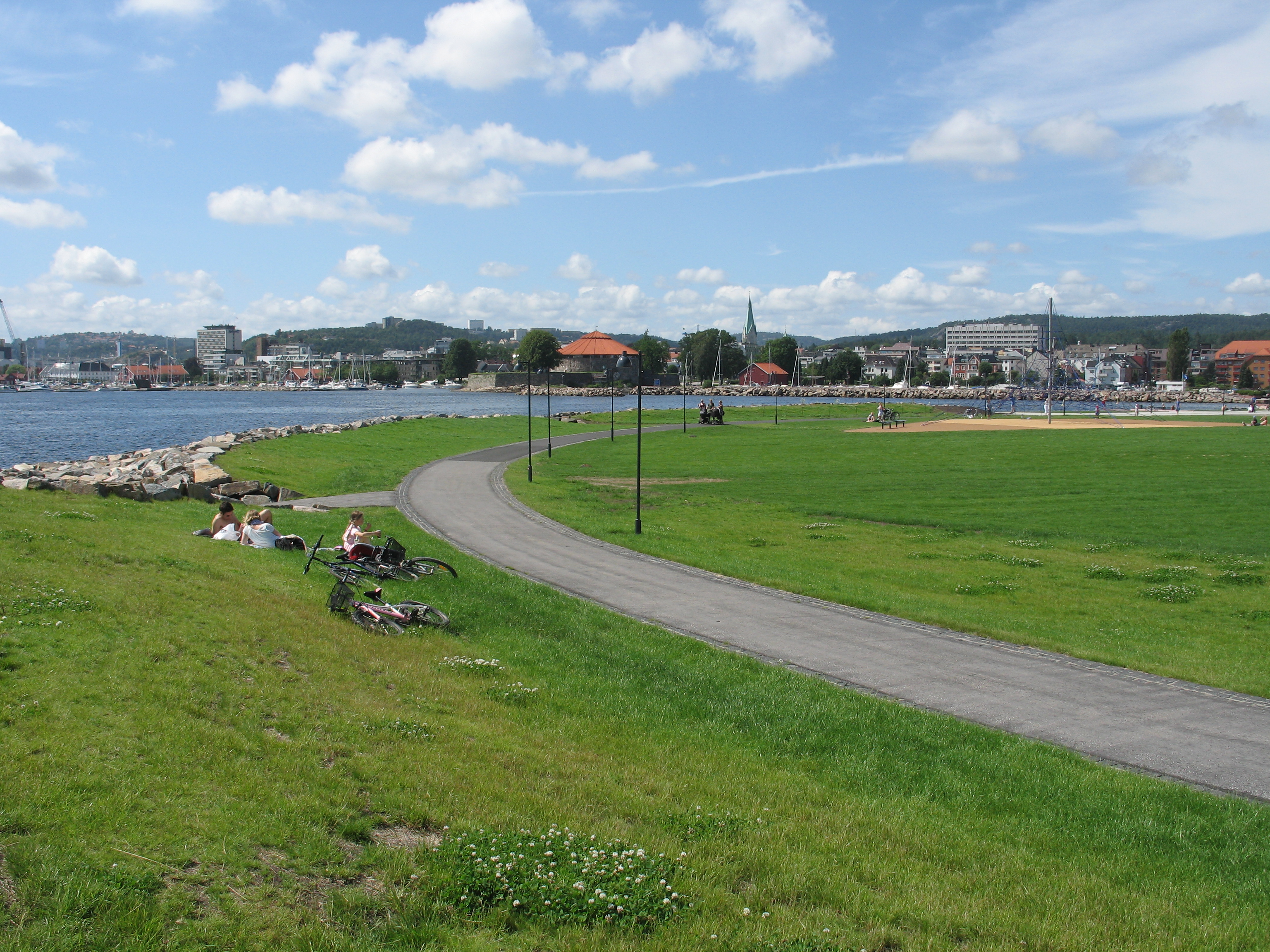 Tangen park i Kristiansand